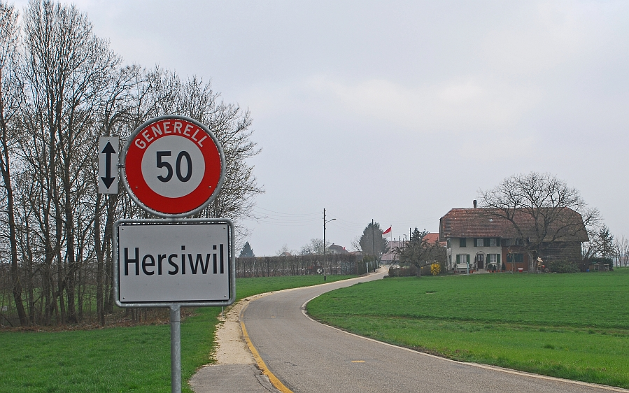 Dorfeingang von Hersiwil